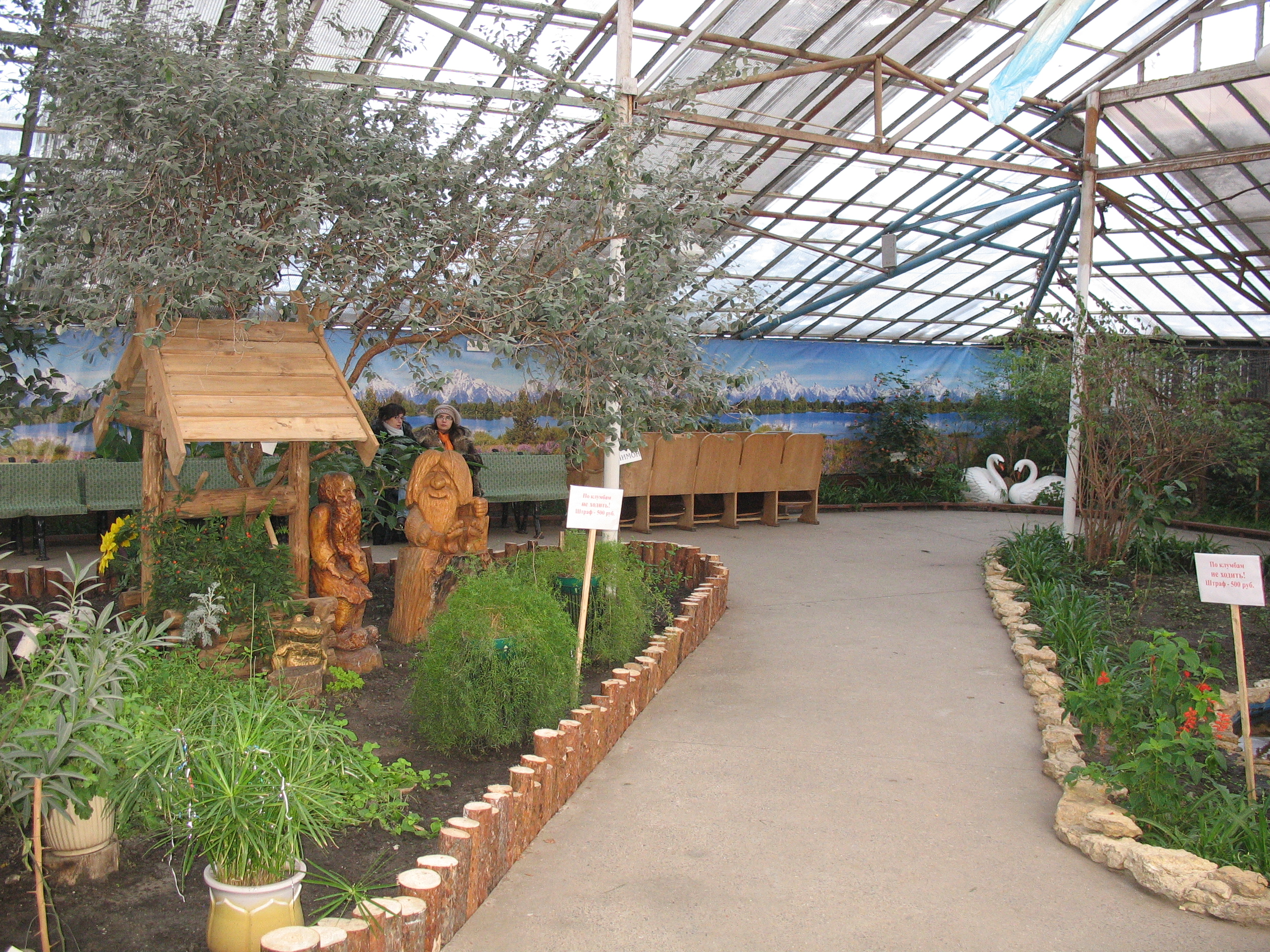 Воронежский зоосад. Зимний сад